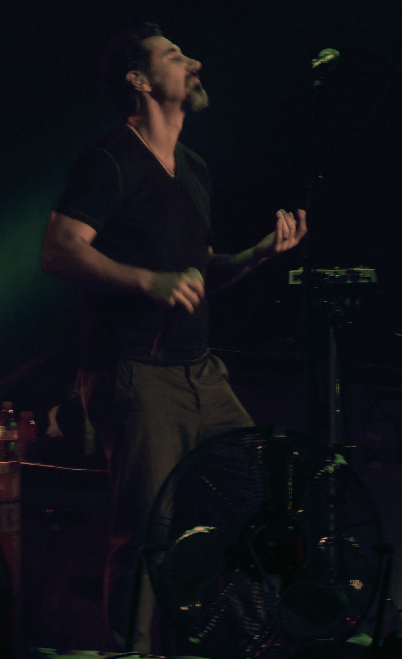 Rock en Seine